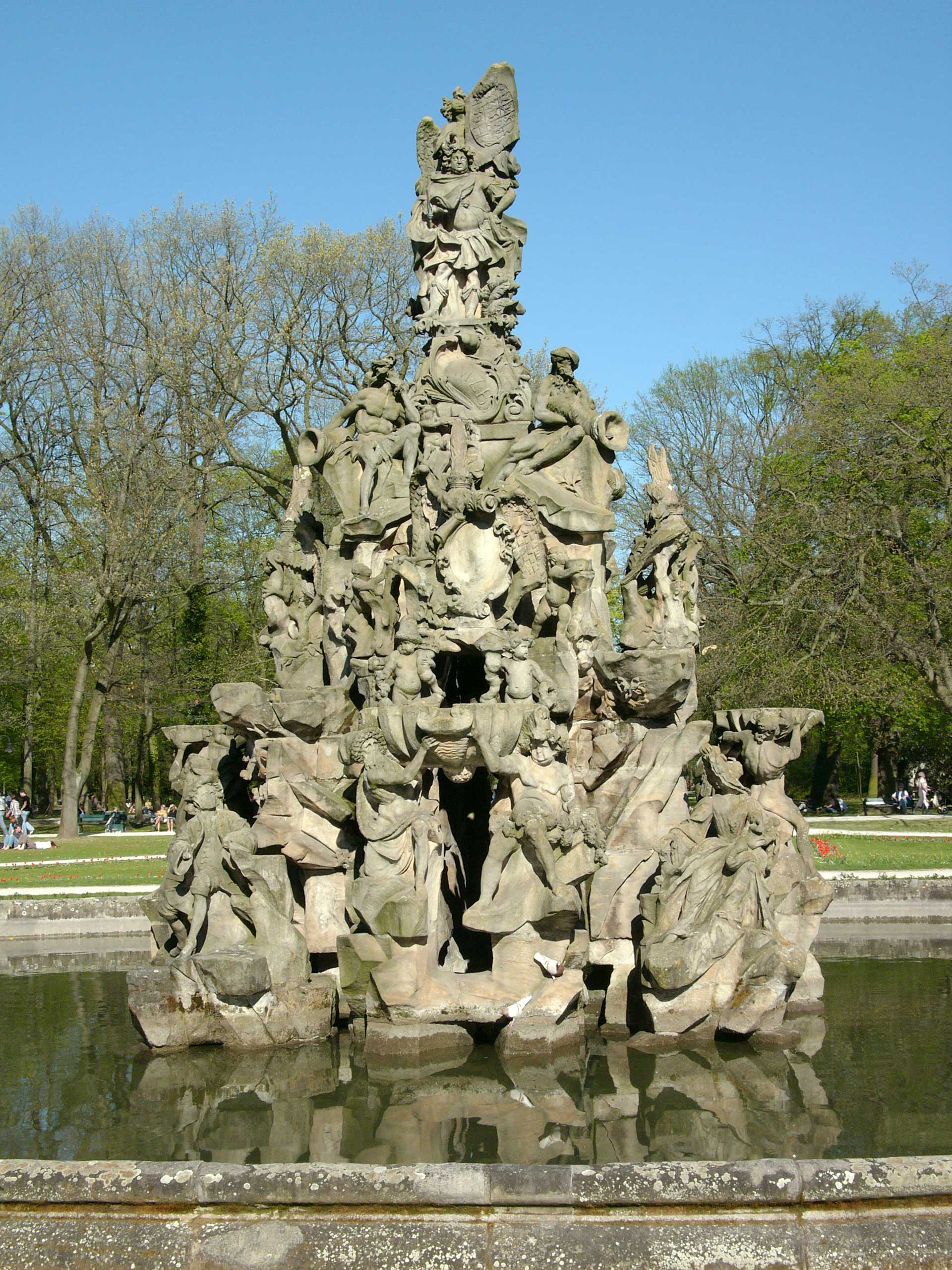 Hugenottesprangbur zu Erlangen.